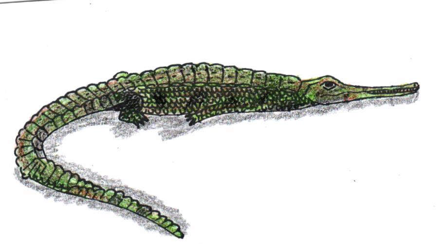 Recreación manual de un Teleosaurus.